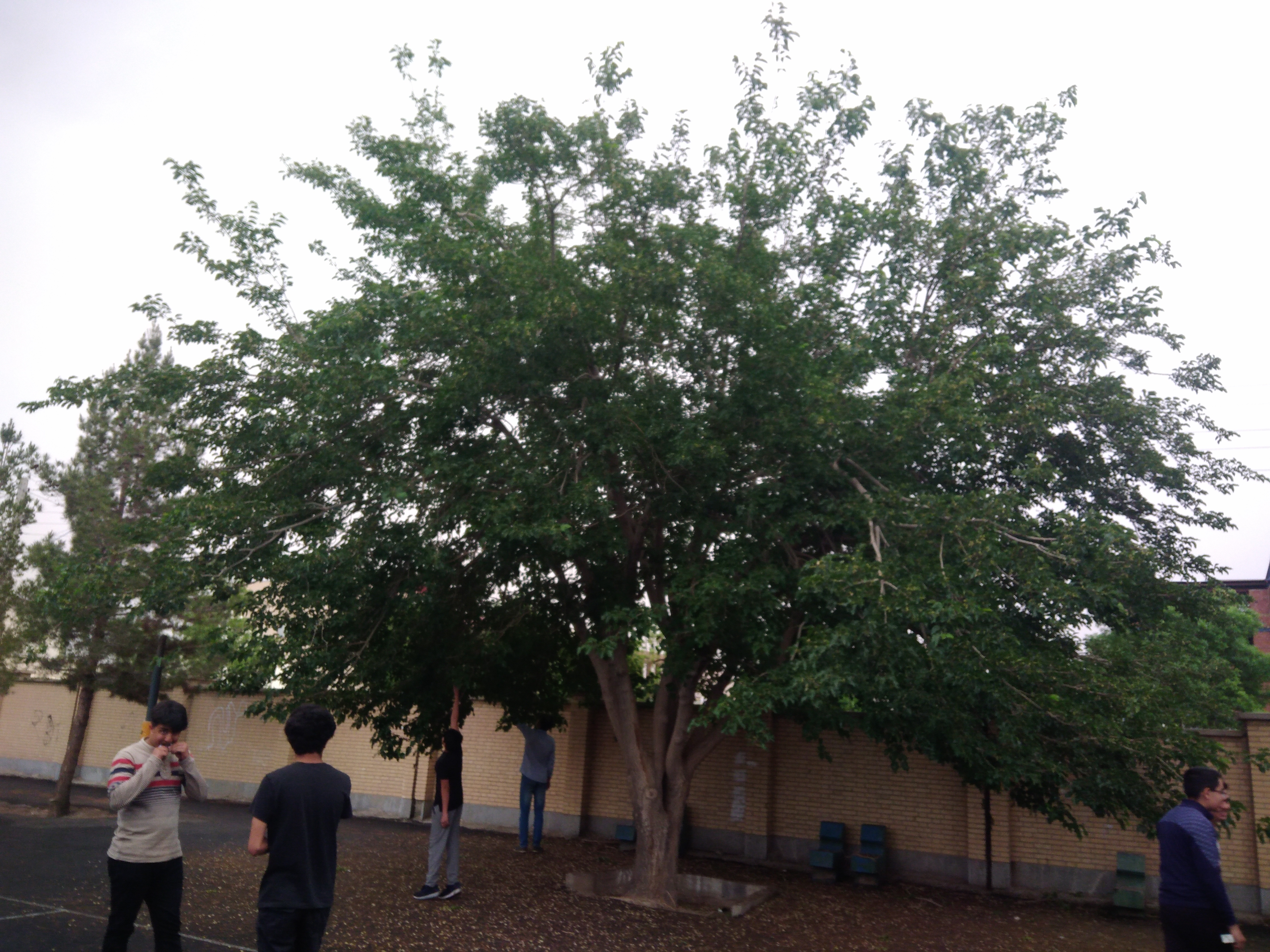 درخت توت